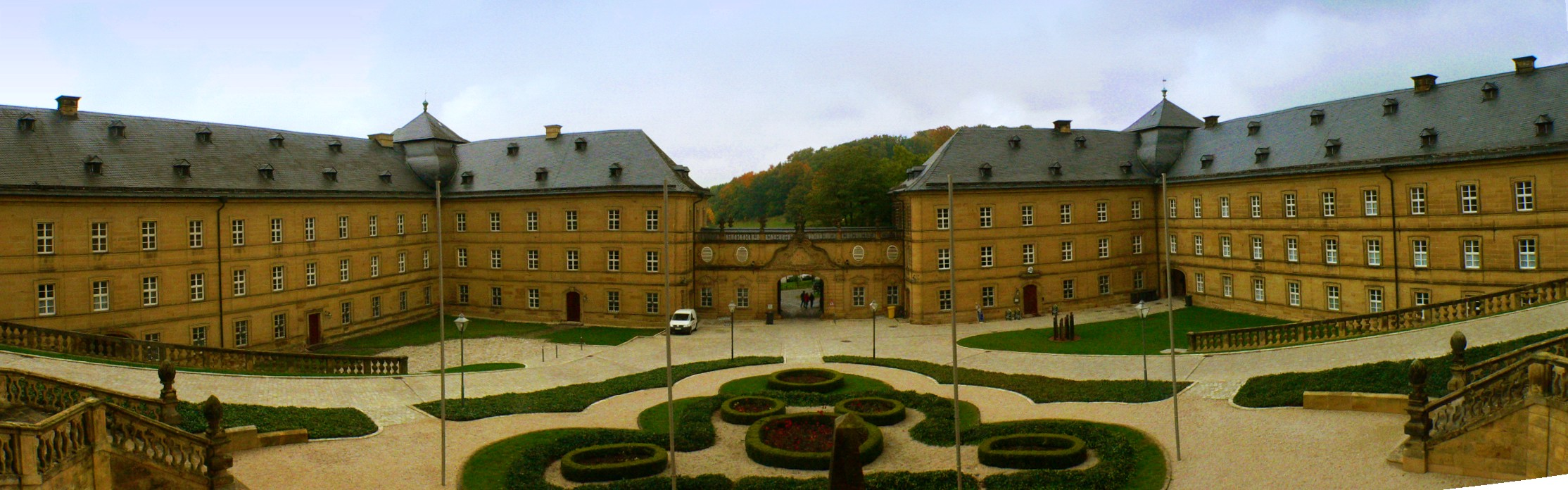 Kloster Banz (Bayern), Innenhof Panorama